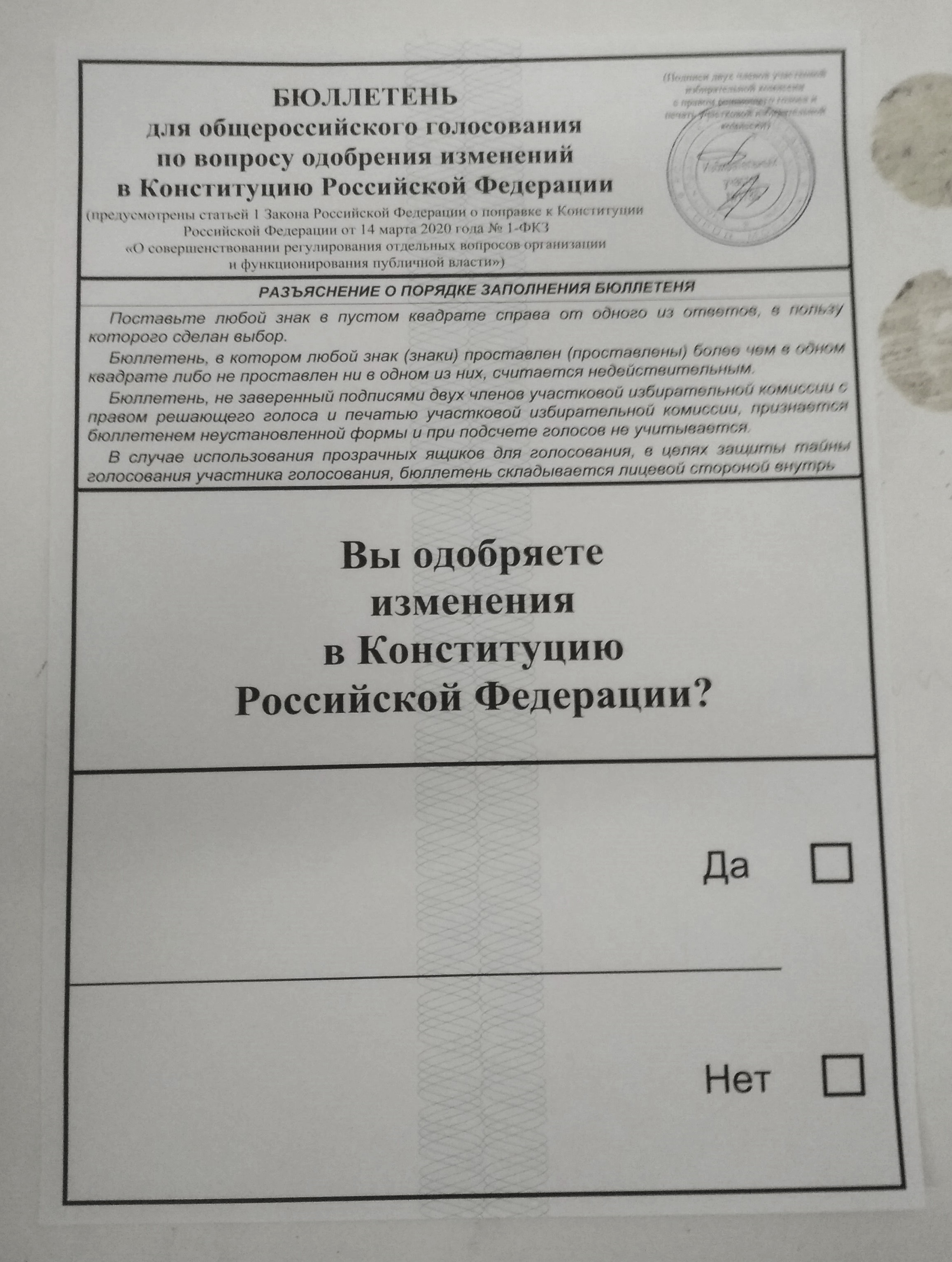 Бюллетень для голосования по вопросу одобрения изменений в Конституцию России